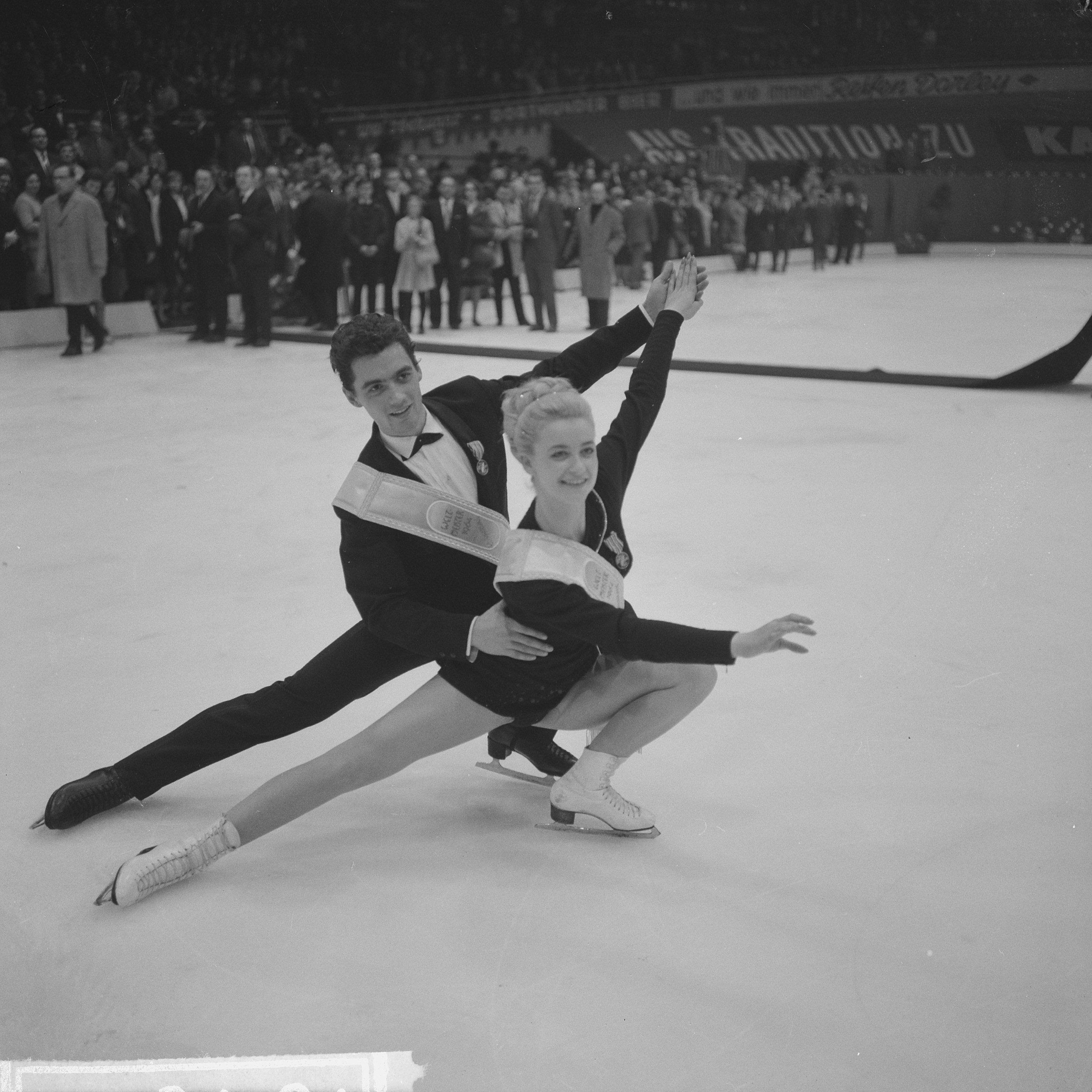 Collectie / Archief : Fotocollectie Anefo Reportage / Serie : Wereldkampioenschap kunstschaatsen 1964 te Dortmund Beschrijving : Winnaars paarrijden. Kilius-Bäumler Datum : 29 februari 1964 Locatie : Dortmund Trefwoorden : kunstschaatsen Persoonsnaam : Bäumler, Hans-Jürgen, Kilius, Marika Fotograaf : Pot, Harry / Anefo Auteursrechthebbende : Nationaal Archief Materiaalsoort : Negatief (zwart/wit) Nummer archiefinventaris : bekijk toegang 2.24.01.03 Bestanddeelnummer : 916-1182